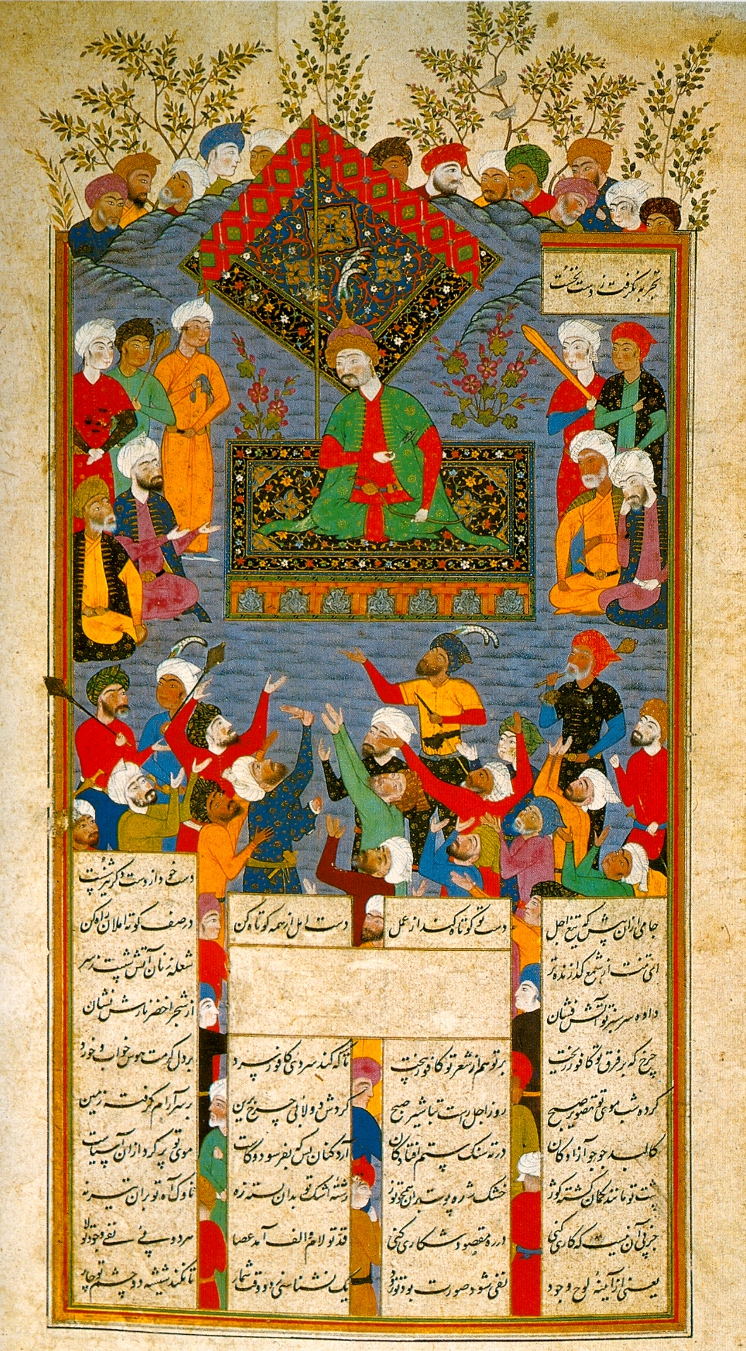 Назначение визиря. «Хафт Ауранг» (Семь престолов) Султана Ибрагима Мирзы. Джами. ок.1571 г. Топкапы Сарай, Стамбул.